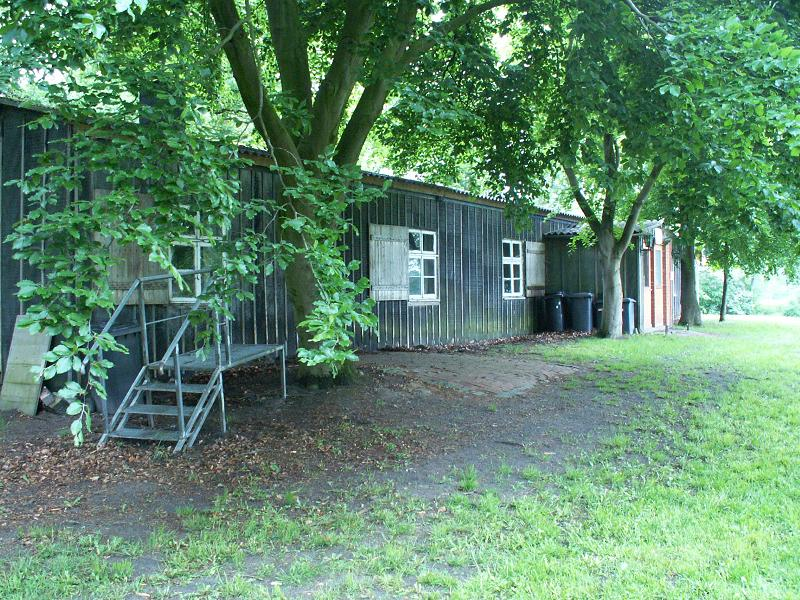 Kamp Versen